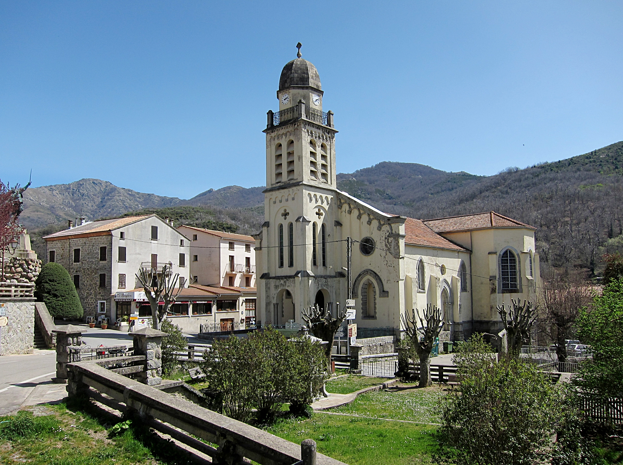 L'église Saint-Michel de Bastelica (Corse).